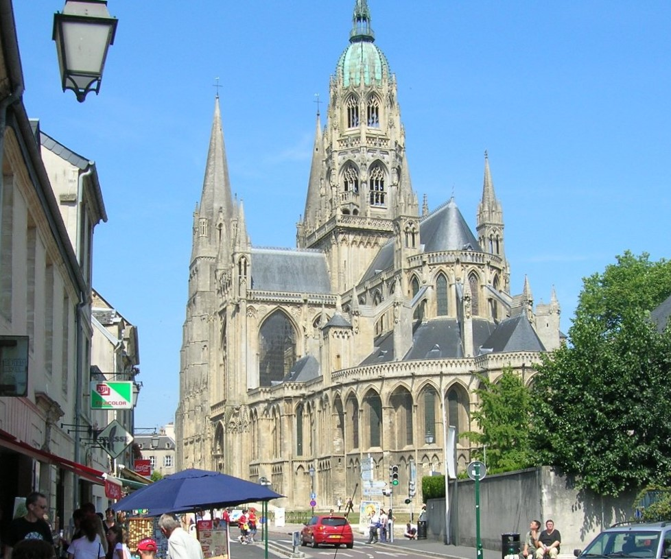 Catedral de Bayeux Bayeux Cathedral. Picture taken July 14, 2005.